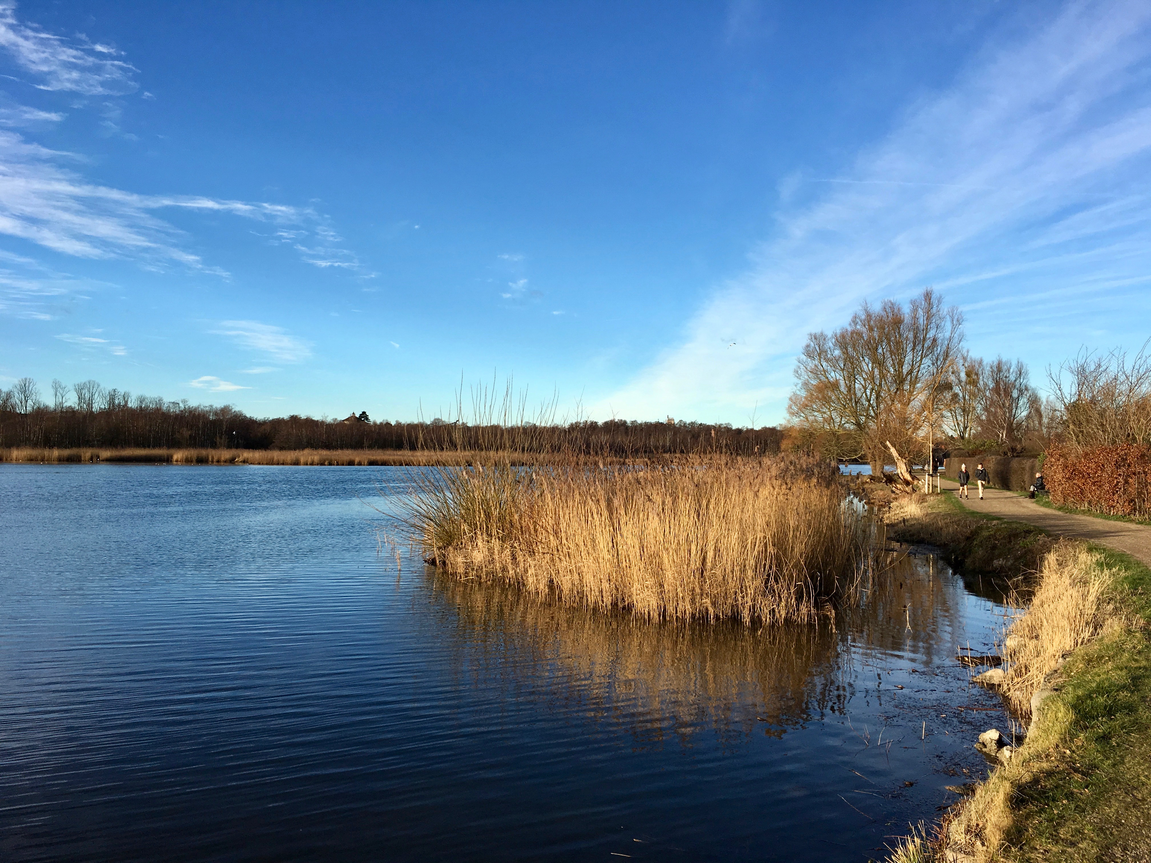 Gentofte Sø i januar 2019